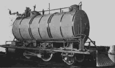 Internals of a soda-powered tramcar of the Minneapolis, Lyndale and Minnetonka Railway Company